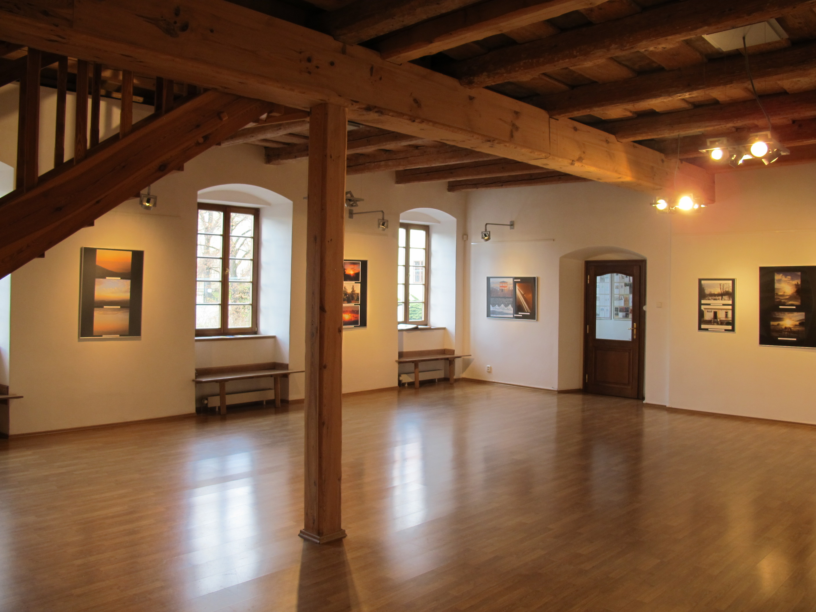 Bývalá radnice, ul. Smetanova čp. 40, Litvínov - výstavní síň v 1. patře